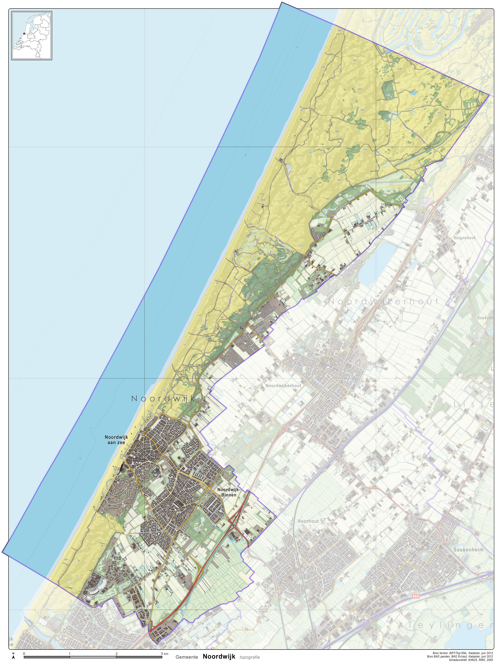 Topografische kaart van de Gemeente Noordwijk. Op basis van de GML open geodata van de Top10NL (basisregistratie Topografie, Kadaster 2011), vrijgegeven door Kadaster op 30-06-2012 onder de Creative Commons BY licentie. Gebouwvlakken uit Open Geodata BAG extract (juni 2012). Relief uit AHN25 van Rijkswaterstaat. Samenstelling en kleurenschema: Jan-Willem van Aalst, met QuantumGIS en Adobe Photoshop.